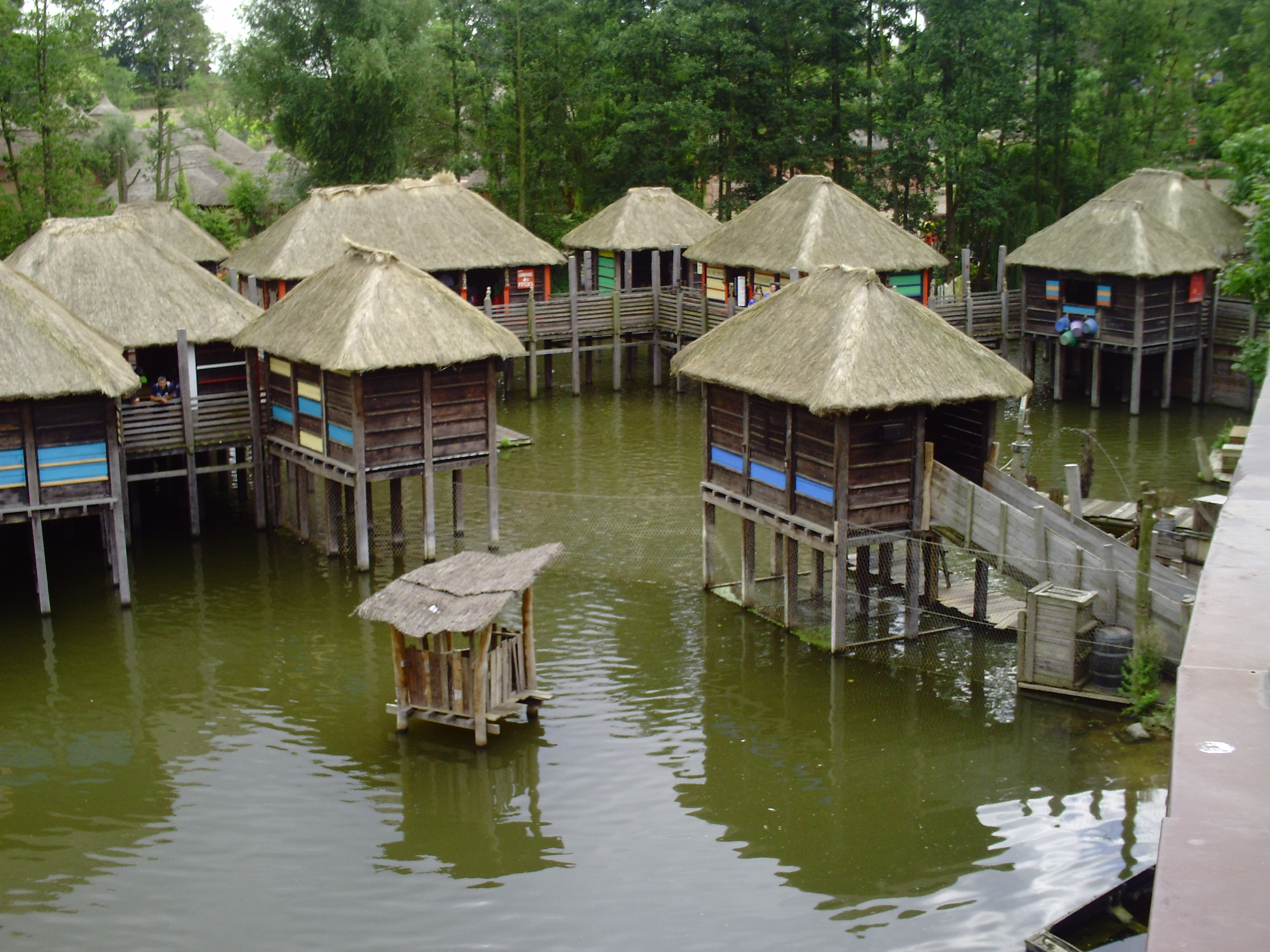 La Terre des origines, Village sur pilotis